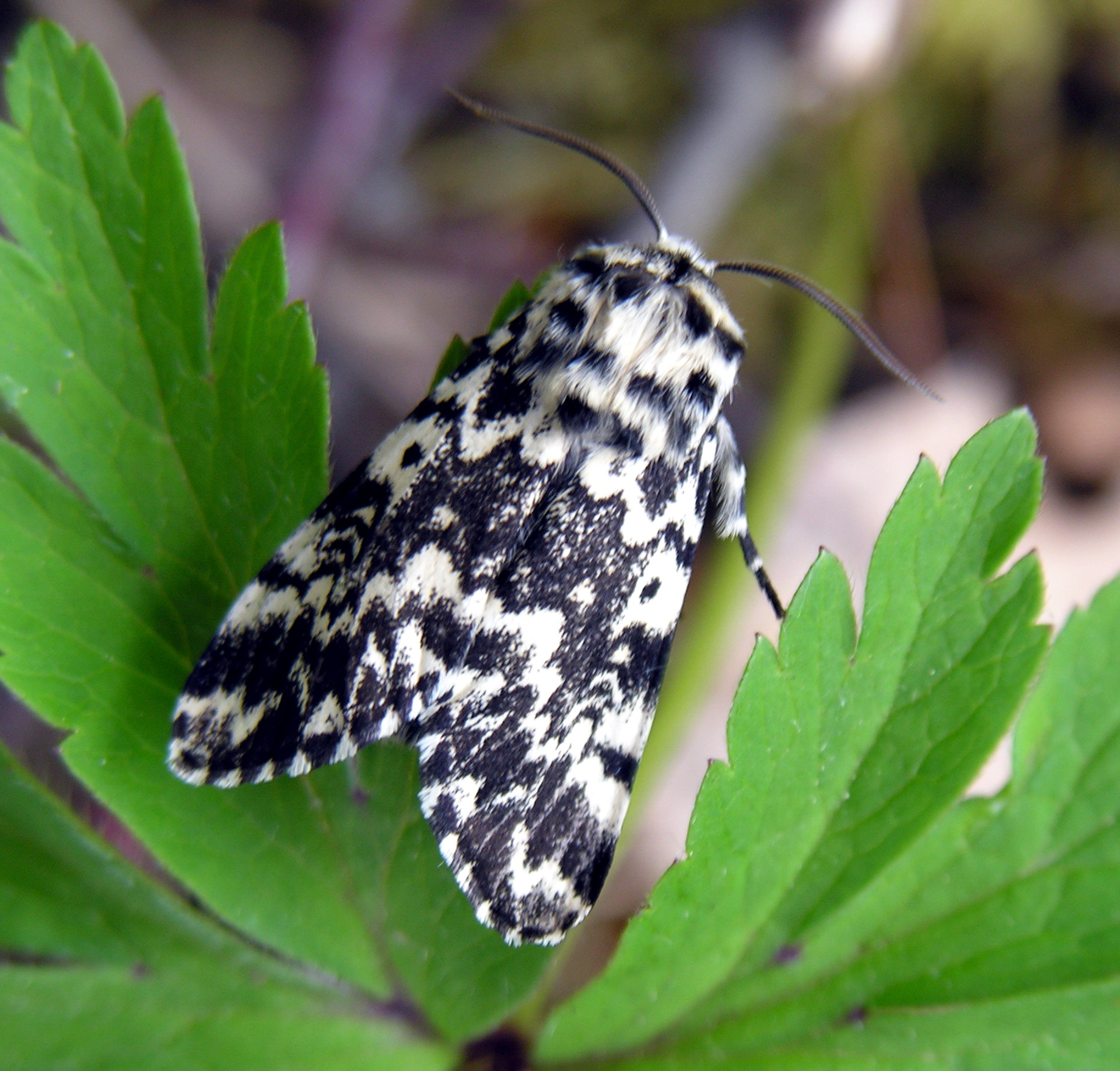 Juodmargis miškinukas (Panthea coenobita) Šeima. Miškinukai (Pantheidae) Foto: Algirdas, 2006 m. gegužės 20 d., Lietuva